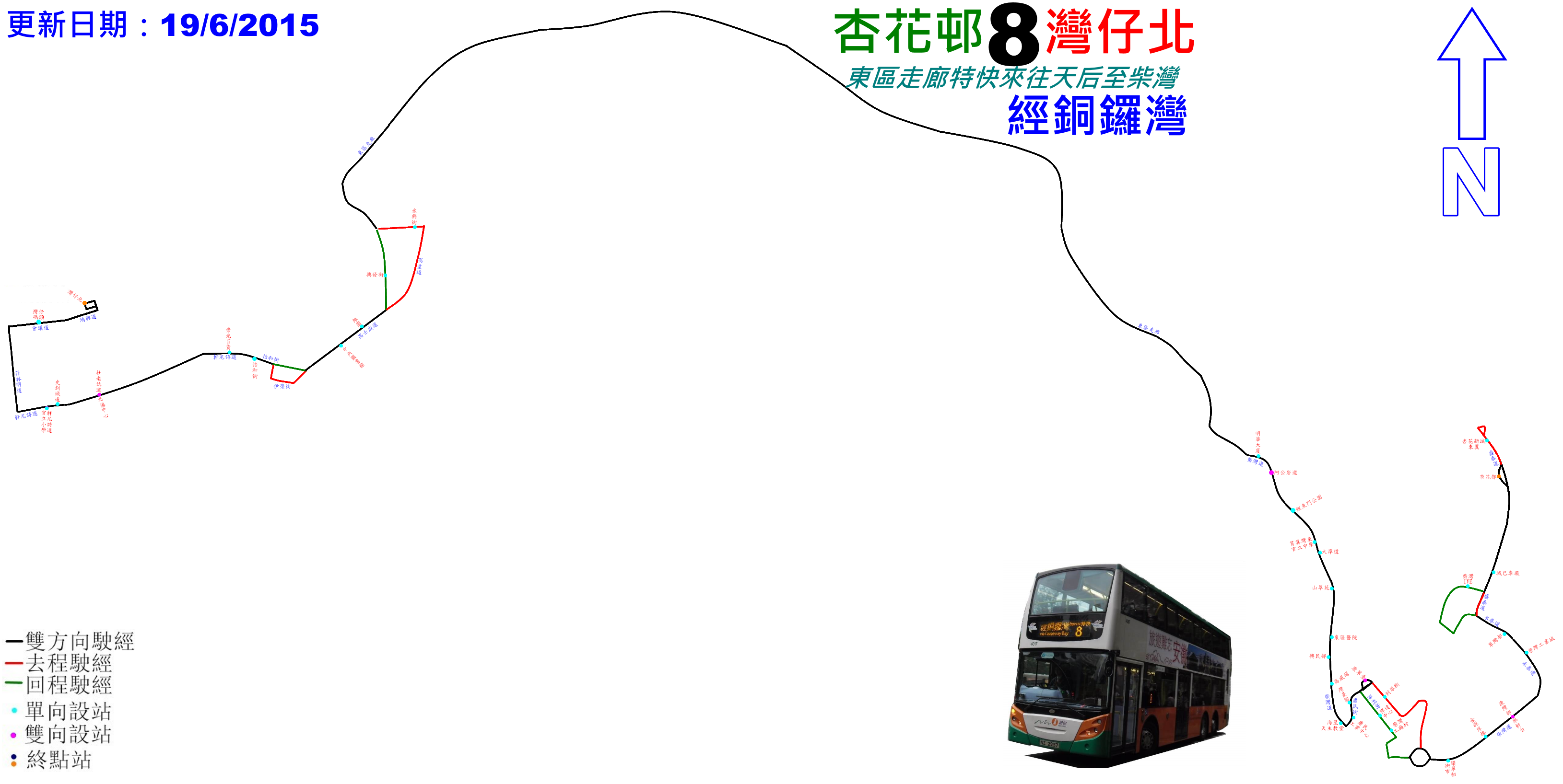 中文（香港）: 新巴8號線的走線圖